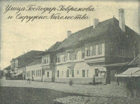 Srpski (latinica): Jevremov konak, XIX vek, detalj sa razglednice